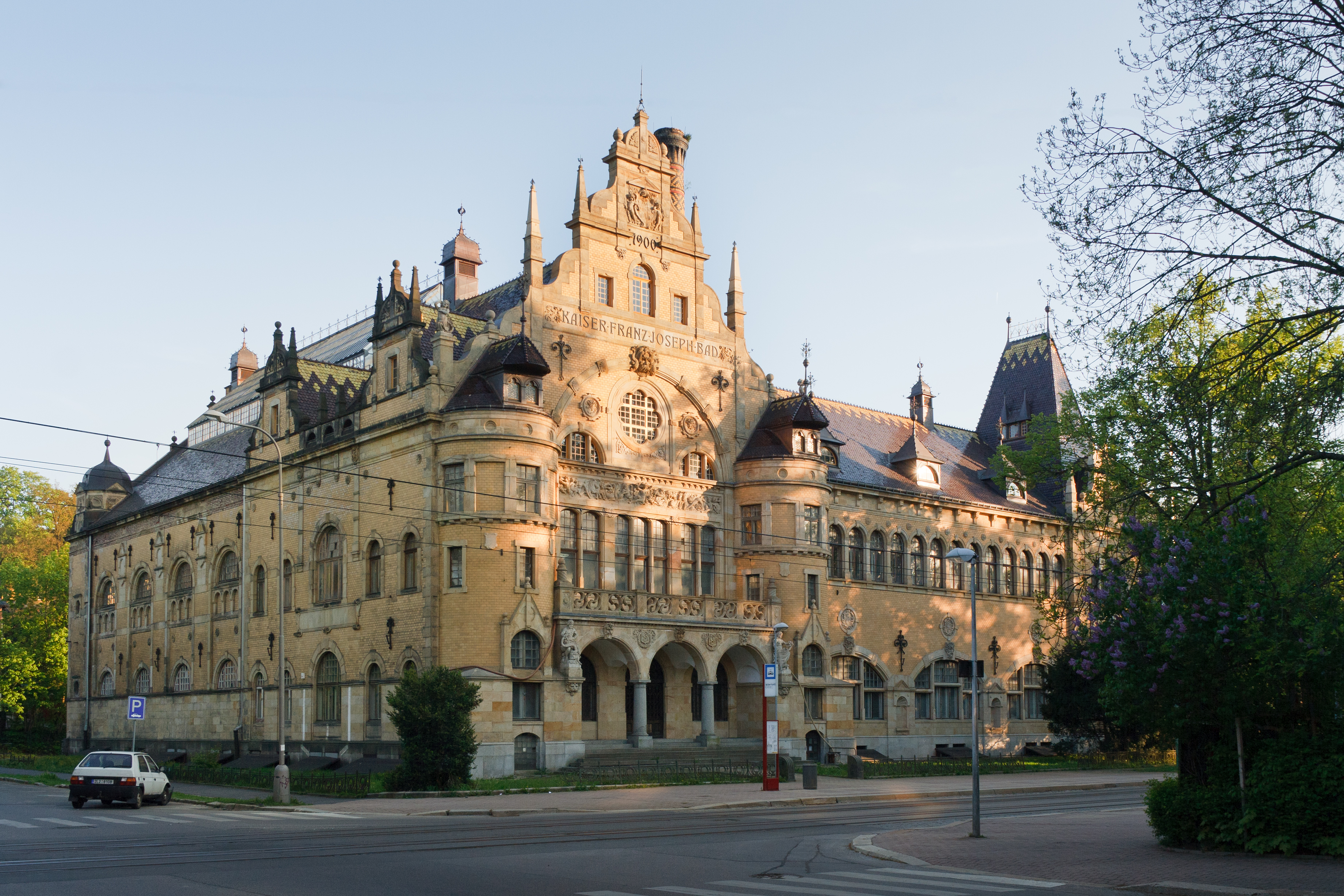 Městské lázně Liberec